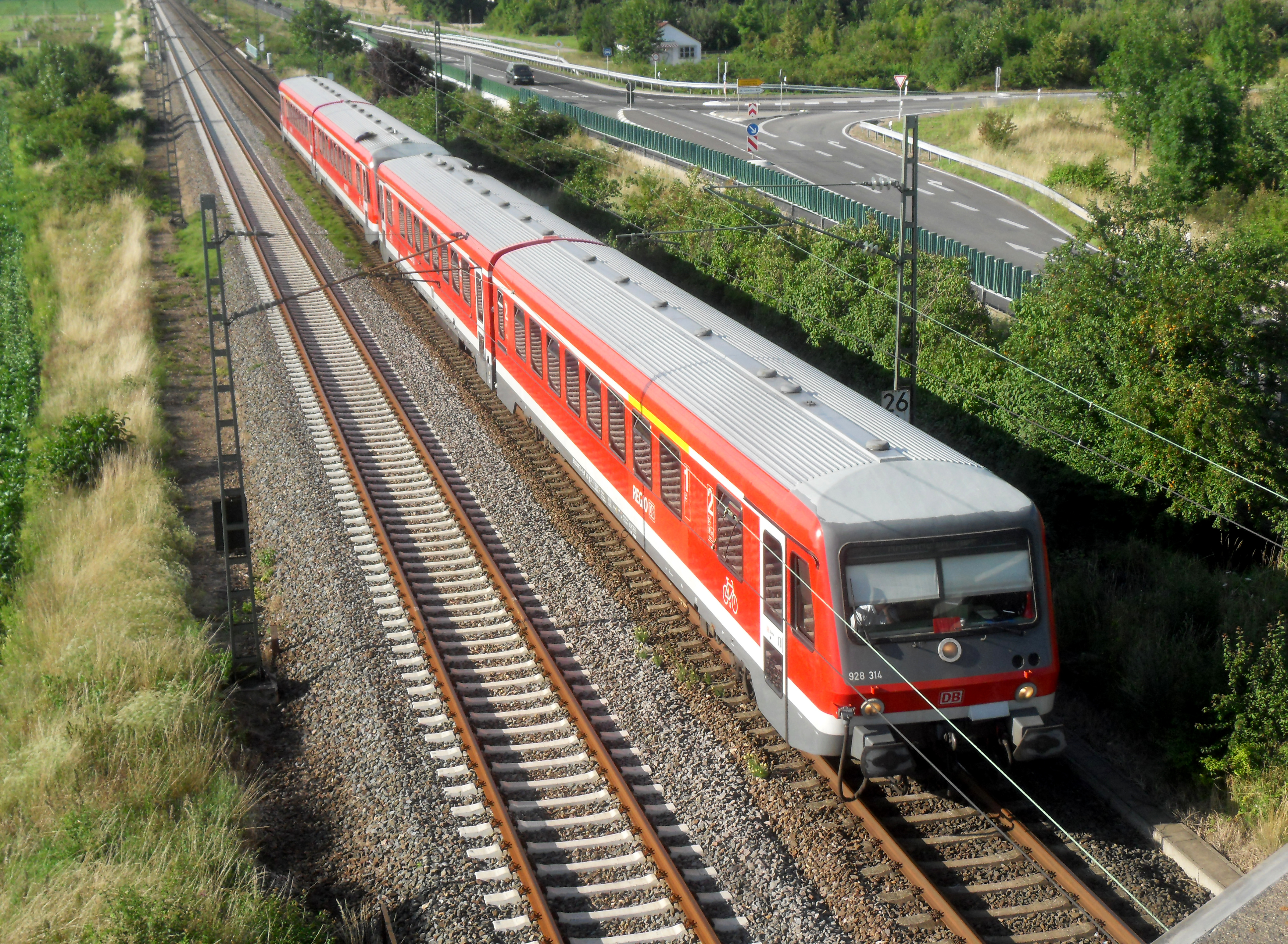 Regionalbahn mit Triebwagen der DB-Baureihe 628 auf der Bahnstrecke Mainz–Ludwigshafen kurz vor dem Guntersblumer Bahnhof auf dem Weg nach Mannheim